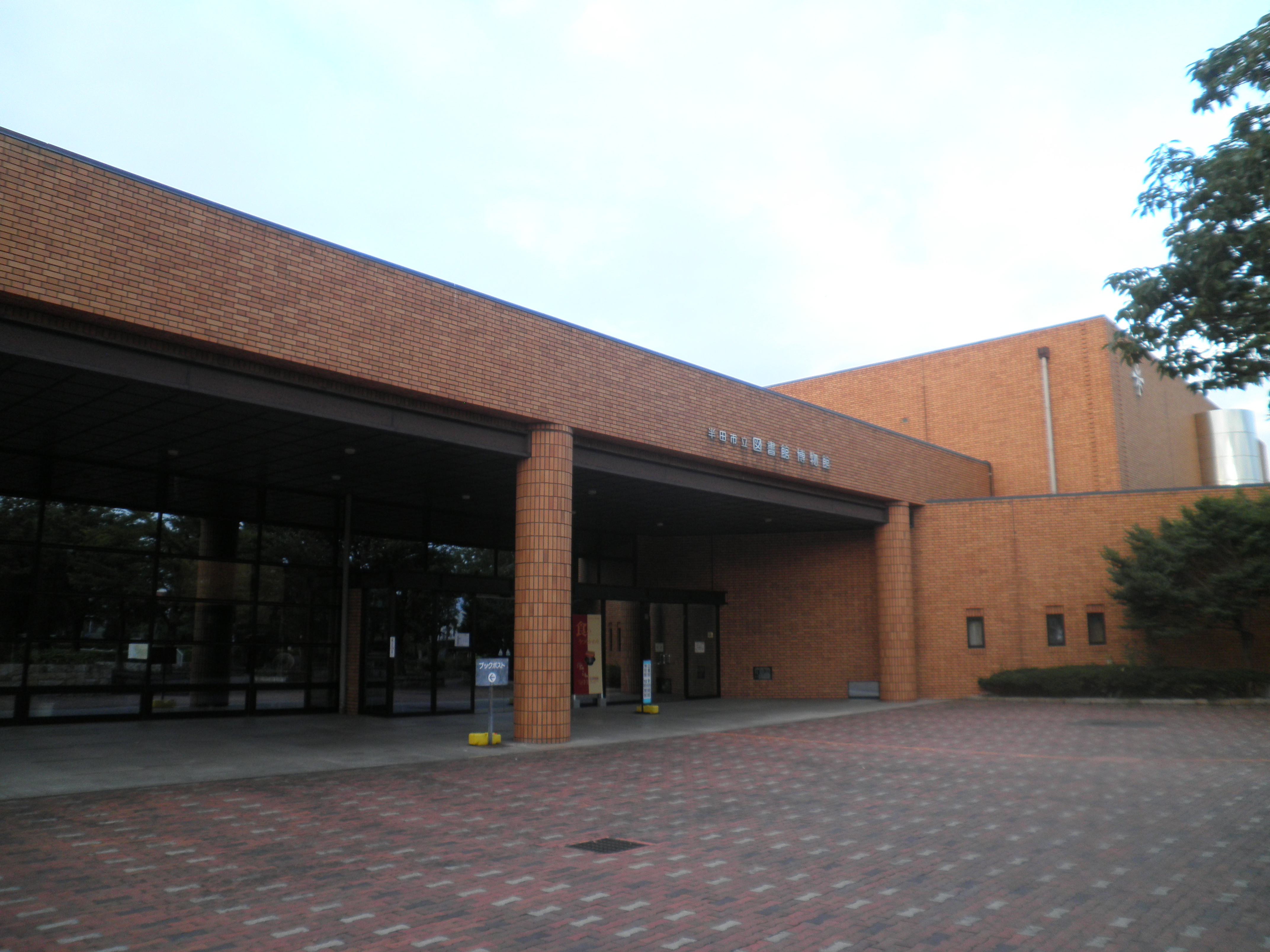 愛知県半田市桐ケ丘4丁目にある半田市立図書館（本館）